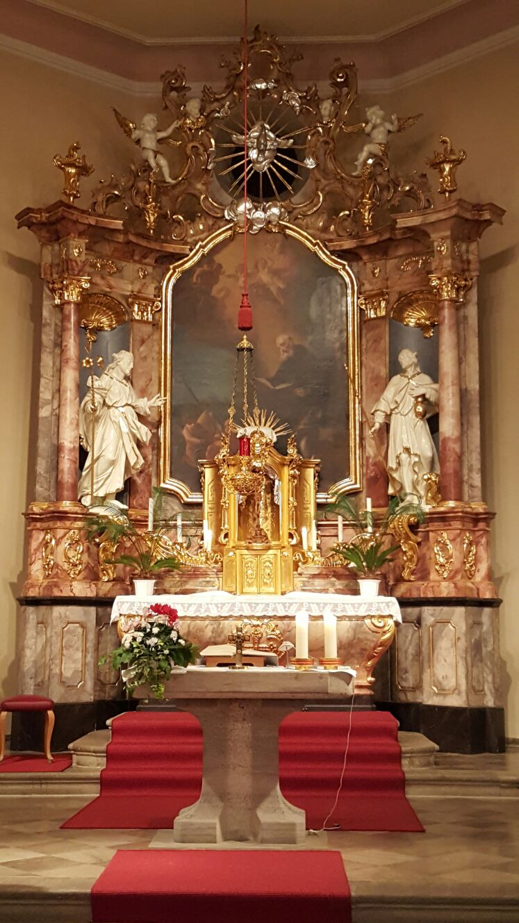 Hauptaltar von St. Ägidius in Krensheim